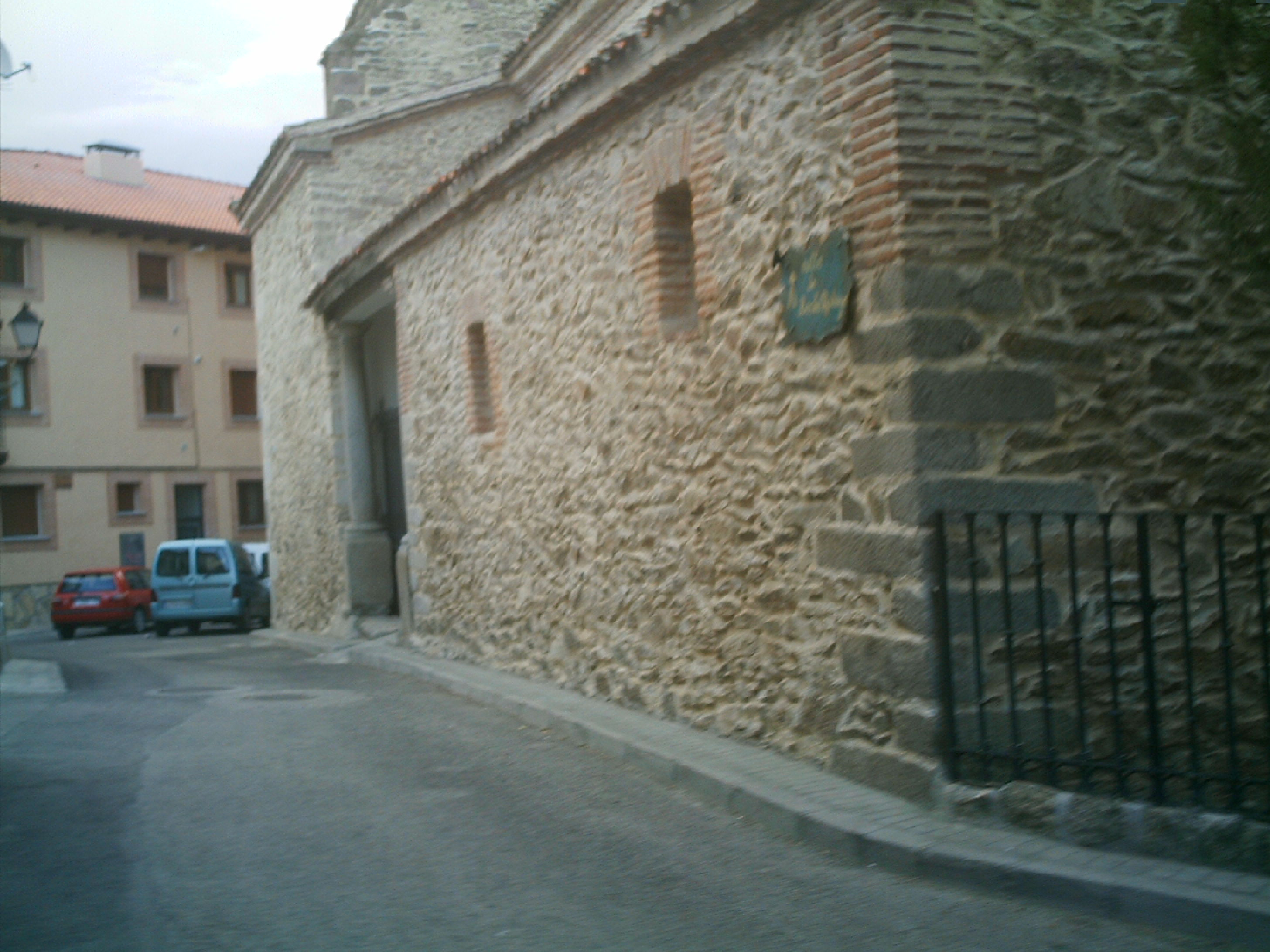 Vista de la iglesia de Miraflores de la Sierra (Madrid, España)